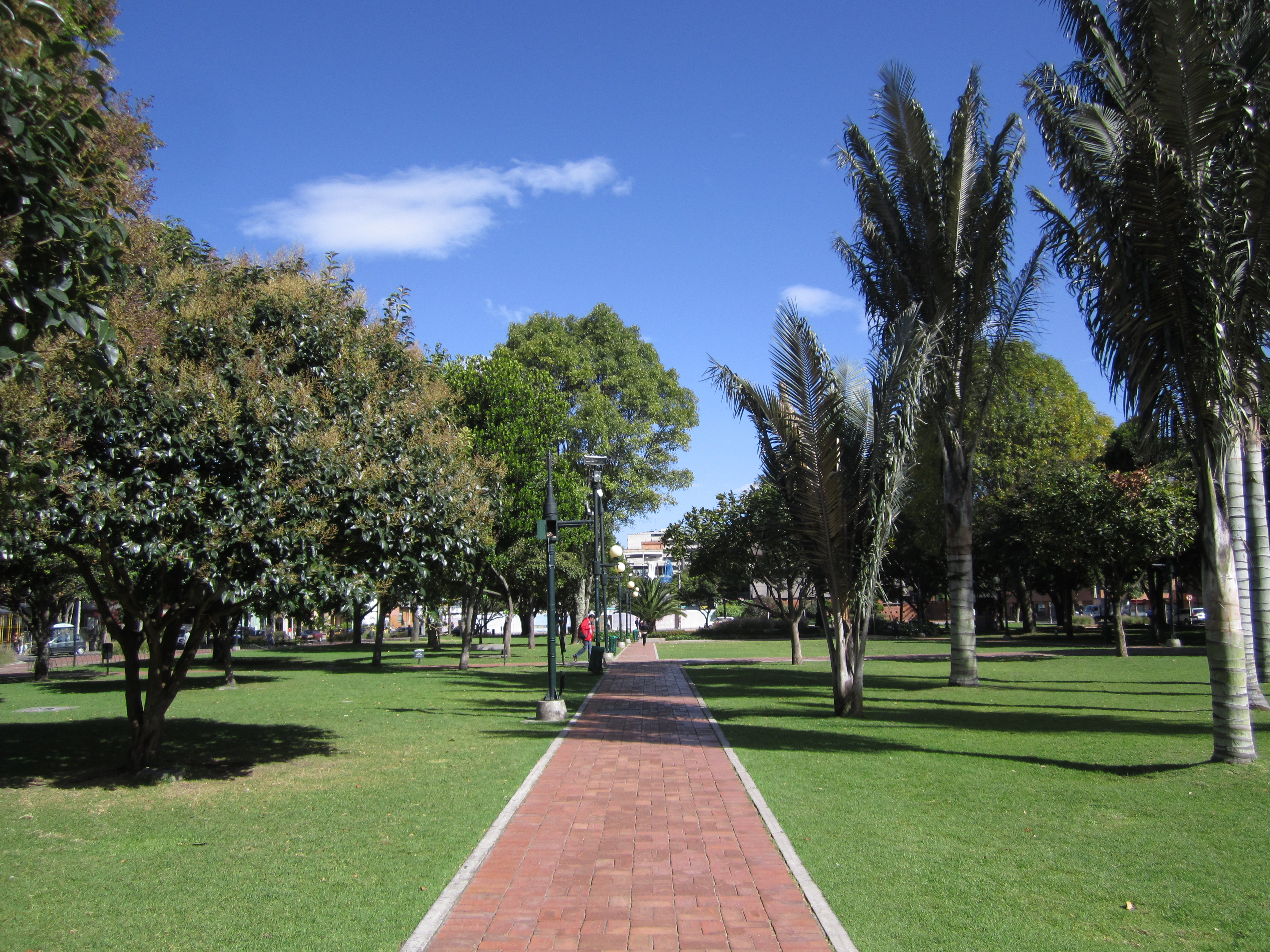 Bogotá - Parque de la Noventa y tres